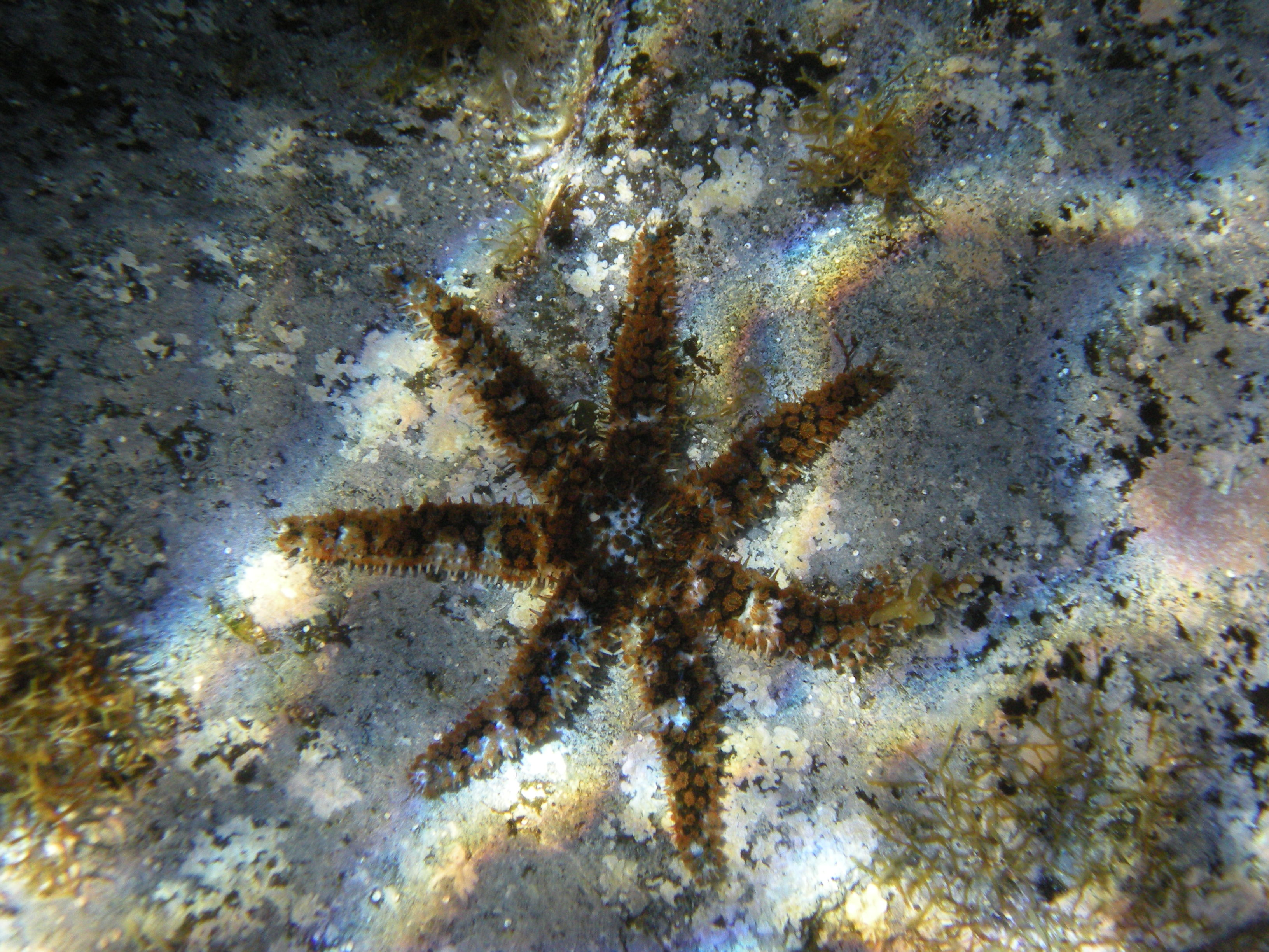 Coscinasterias tenuispina Linosa, Sicily